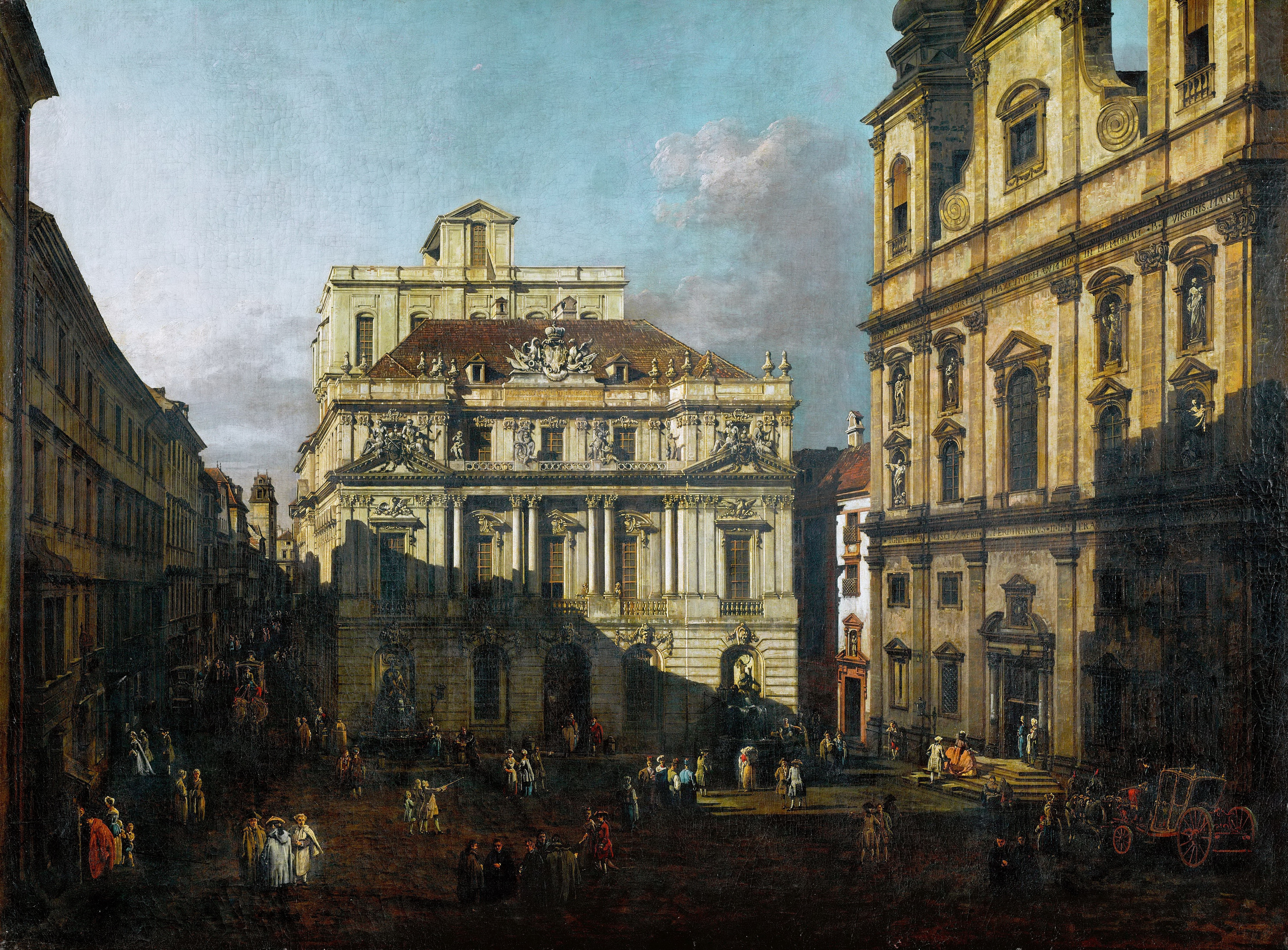 Ansicht von Wien: Platz vor der Alten Universität, von Südost aus gesehen, mit der großen Aula der Universität (Neue Aula, heute Sitz der Österreichischen Akademie der Wissenschaften) und der Jesuitenkirche